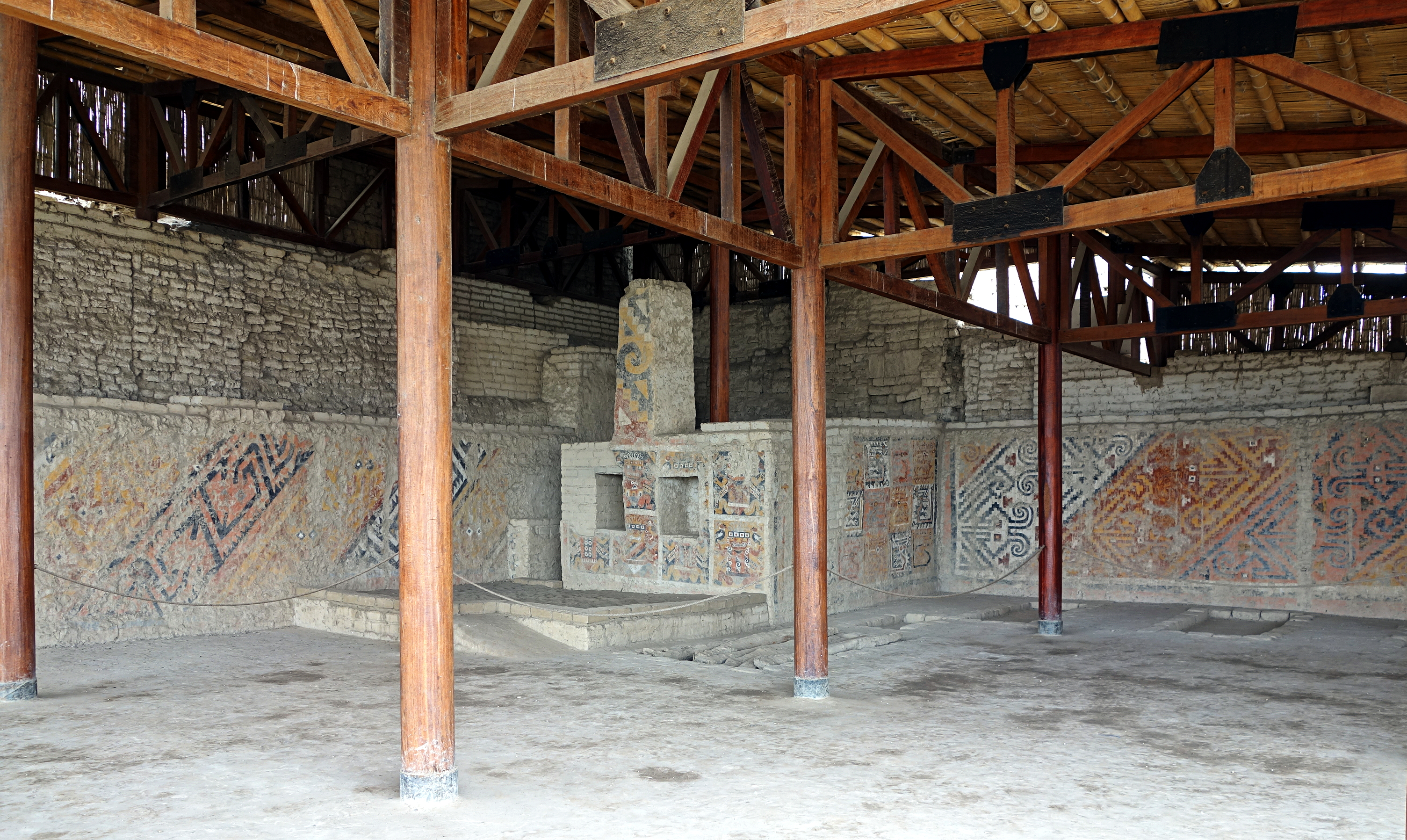 Fresques murales dans la Huaca Cao Viejo (Pérou).